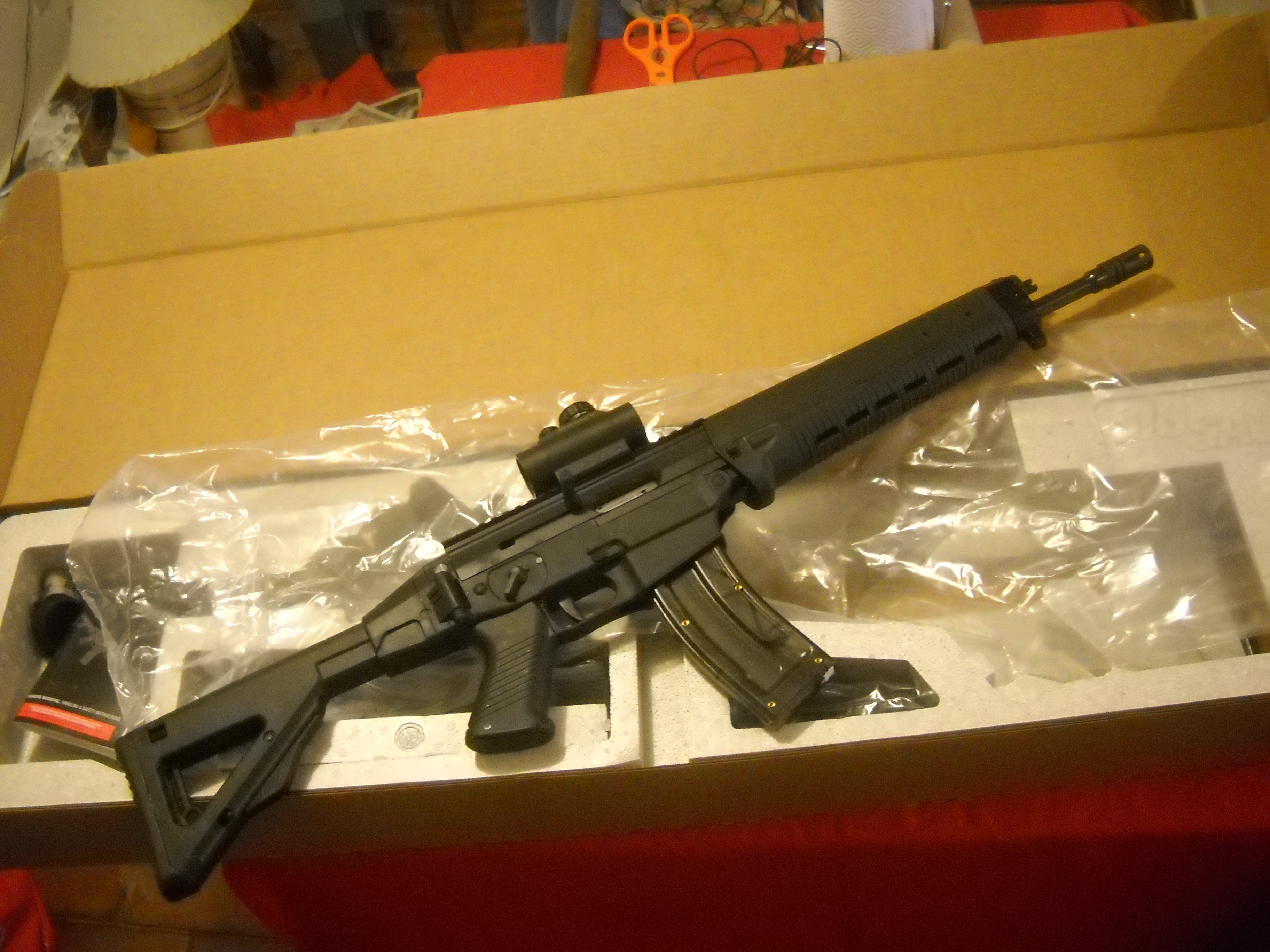 Carabina Sig 522LR, en su caja original.